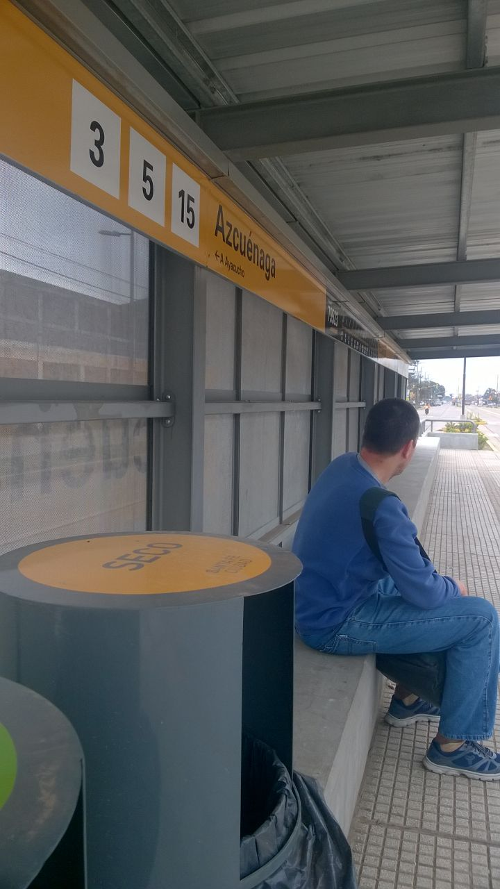 Parada Azuénaga del Metrobús Santa Fe.